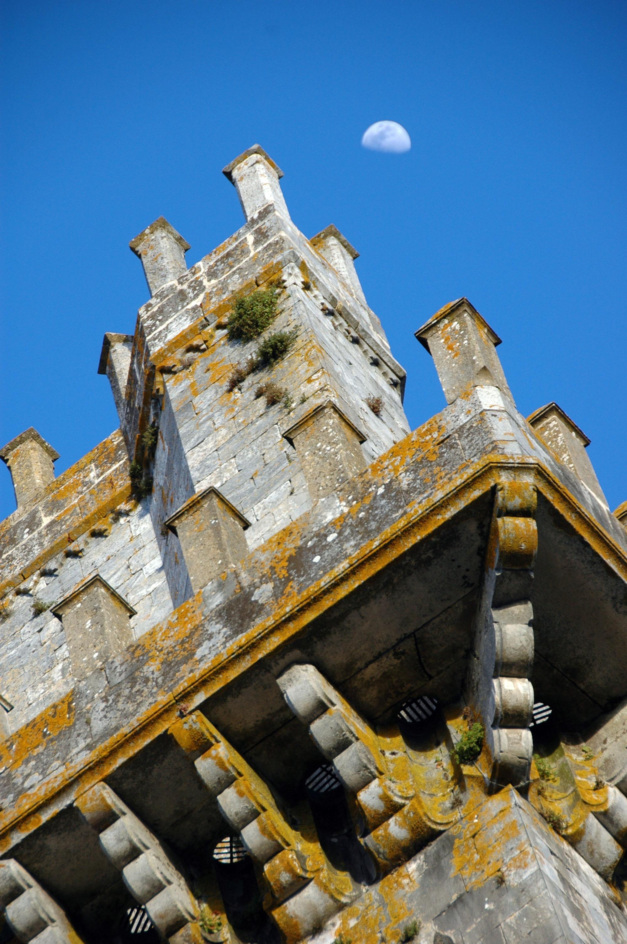 playmobil